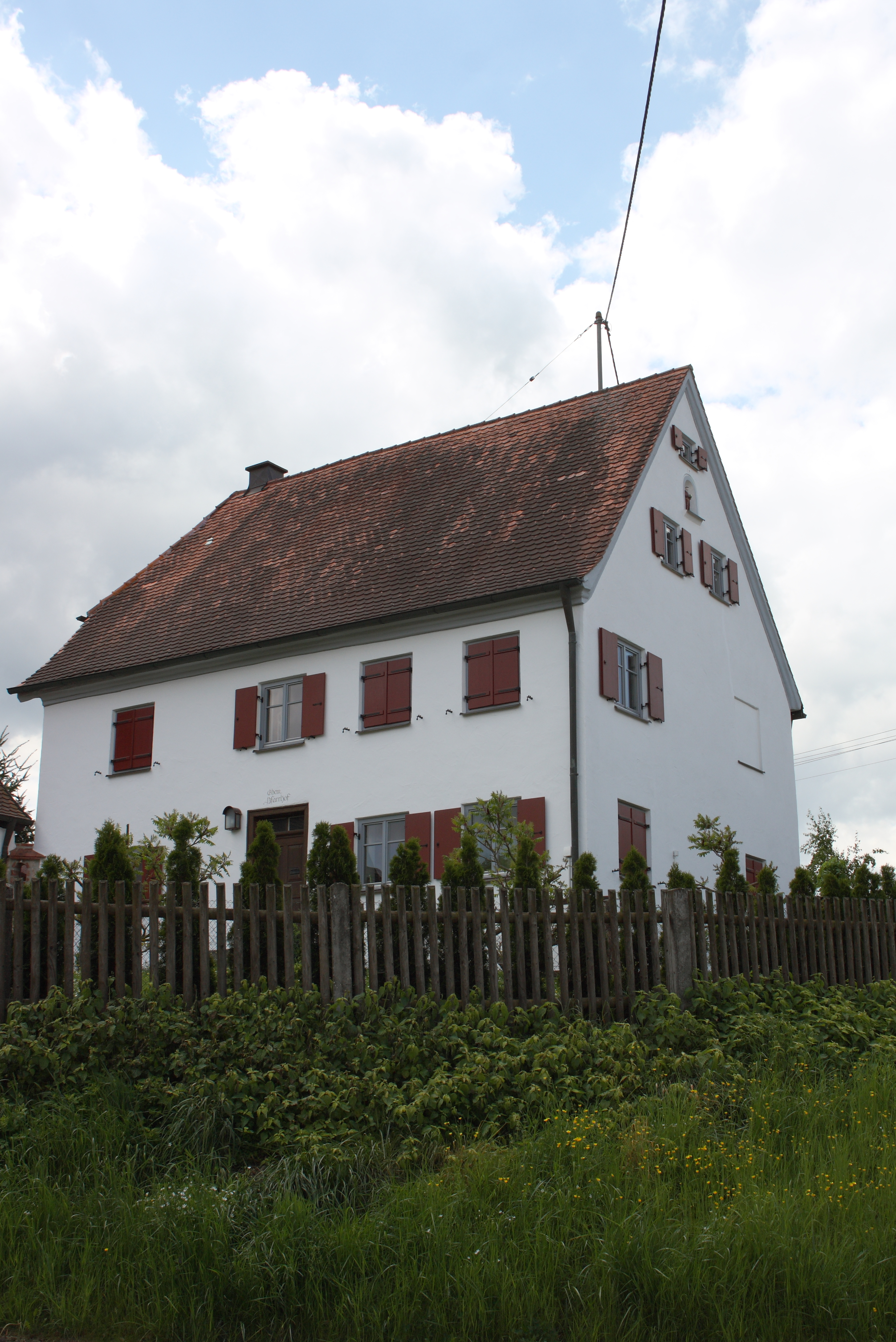 Ehemaliges Pfarrhaus in Buggenhofen, einem Ortsteil von Bissingen im Landkreis Dillingen an der Donau (Bayern), Ende 18. Jahrhundert